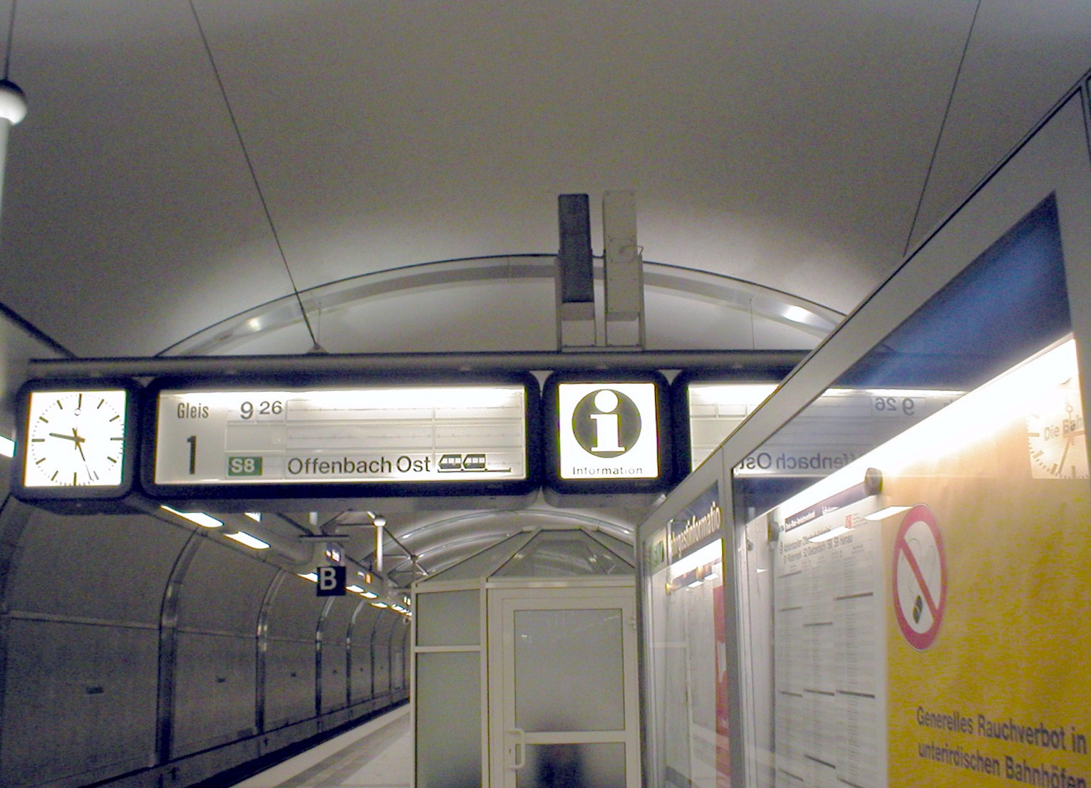 Kaiserlei Station in Offenbach, Germany